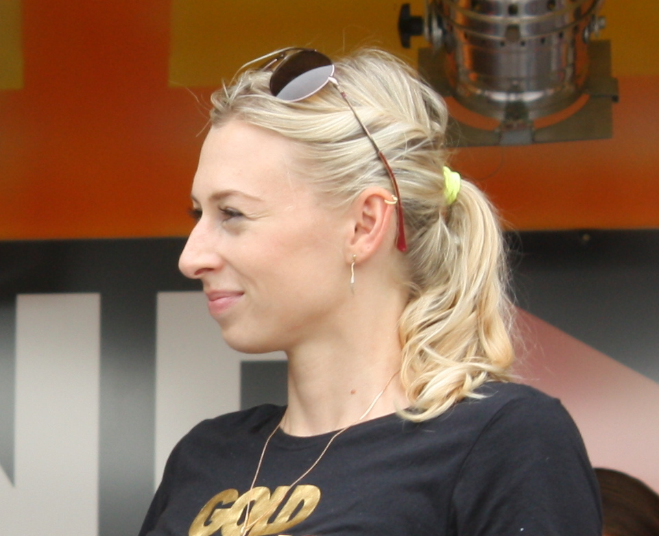 Lisa Ryzih beim Empfang der Olympia-Teilnehmer des Teams London der Metropolregion Rhein-Neckar 2012 in Mannheim.